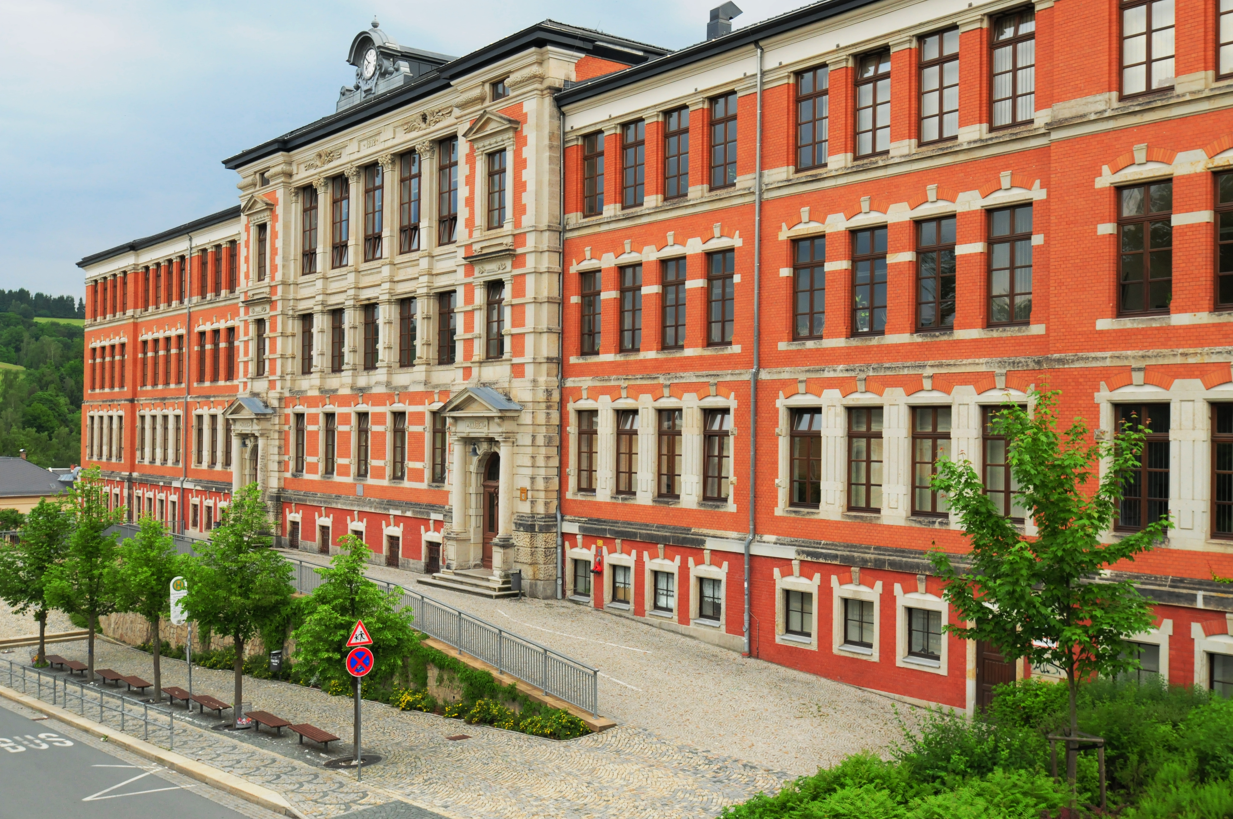 Markneukirchen, Gymnasium (Vogtlandkreis, Sachsen, Deutschland)